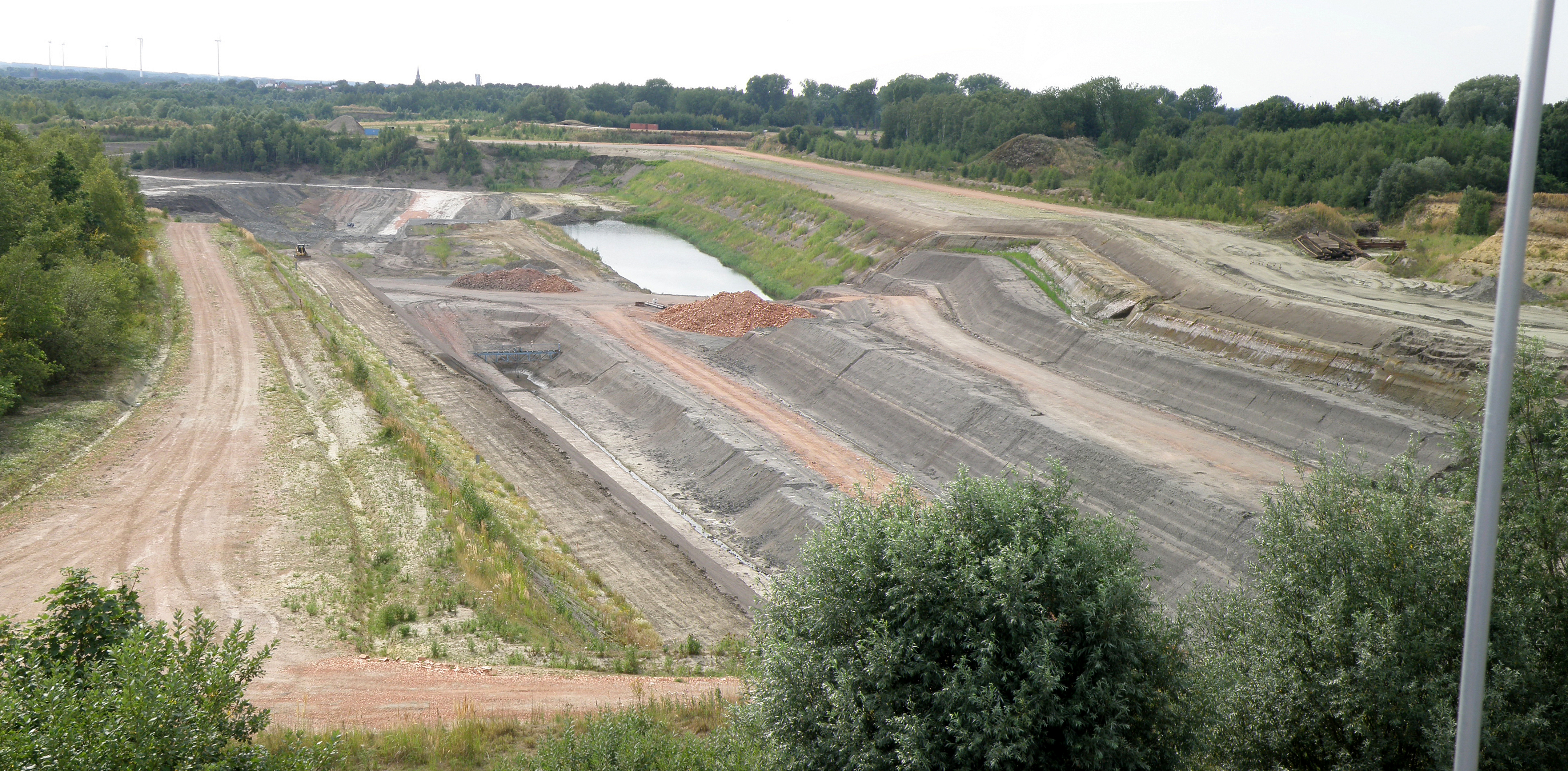 Rumst (prov. Antwerpen, België). Kleiputten, gezien vanop de watertoren aan de Rumstsestraat.